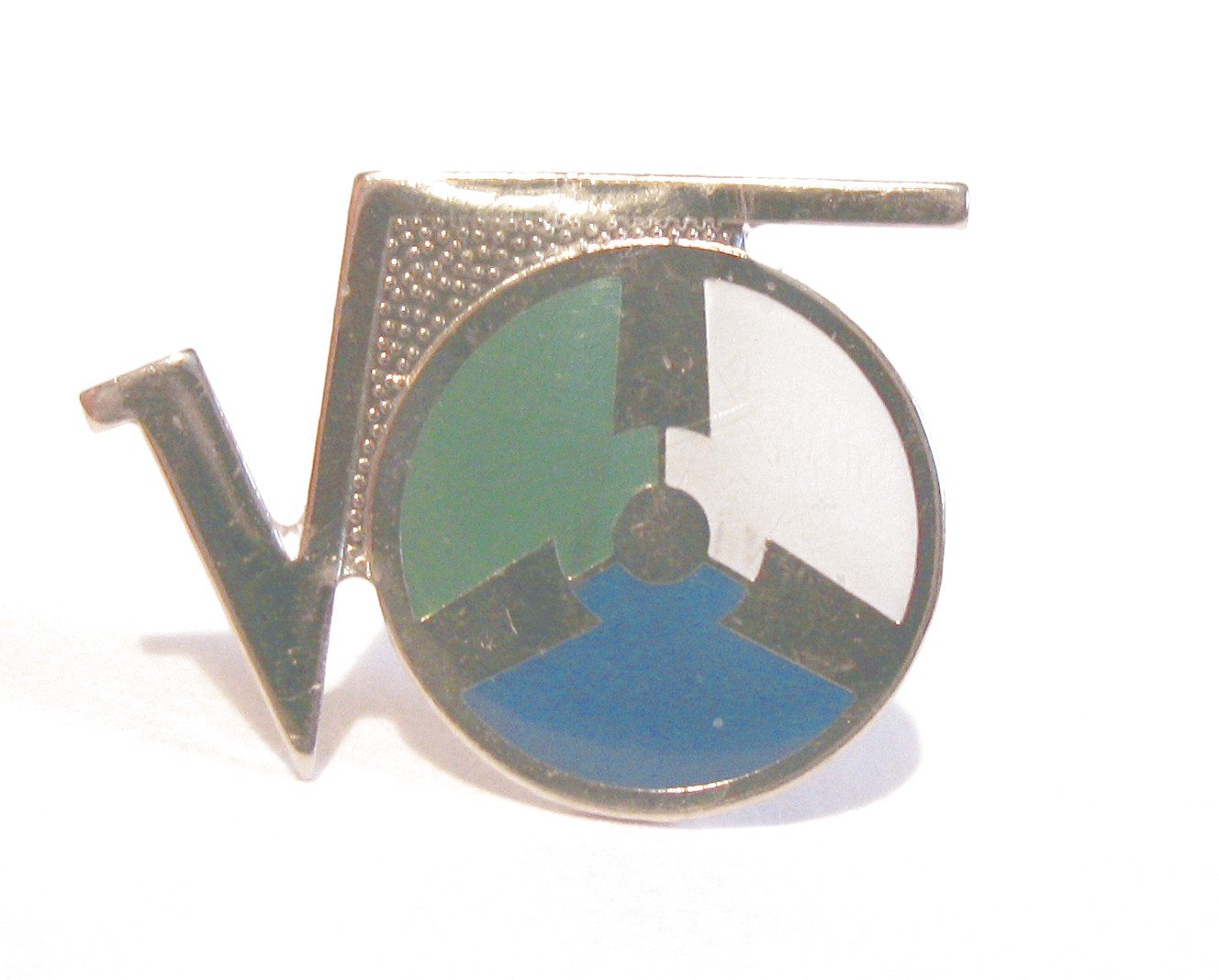 The pin that the course graduates recieve. The original one is silver. הצבעים בסיכת התוכניתן מסמלים את שלושת הזרועות אליהם מופנים התוכניתנים לאחר סיום הקורס: אוויר (כחול), ים (לבן) וזרוע היבשה בירוק. גלגל הסרט מסמל את המחשב המרכזי והשורש את הלוגיקה שבכתיבת תוכנה סיכה זו מבוססת על סיכת ממר"מ שיצאה משירות לאחר הקמת בסמ"ח